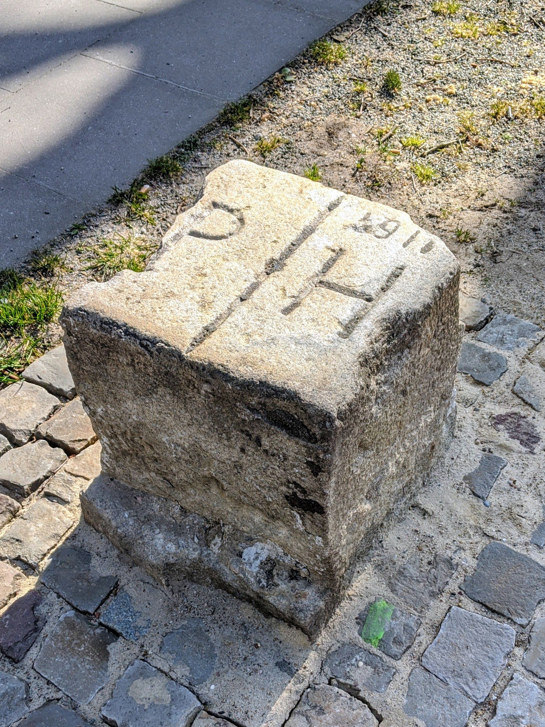 ehemaliger Grenzstein zwischen Preußen und Hamburg, Hammer Straße in Hamburg-Marienthal, ursprünglich im Straßenpflaster verlegt, später unter dem Asphalt verborgen und im Zuge des Neubaus der Bahnunterführung wiedergefunden und neben der Straße aufgestellt